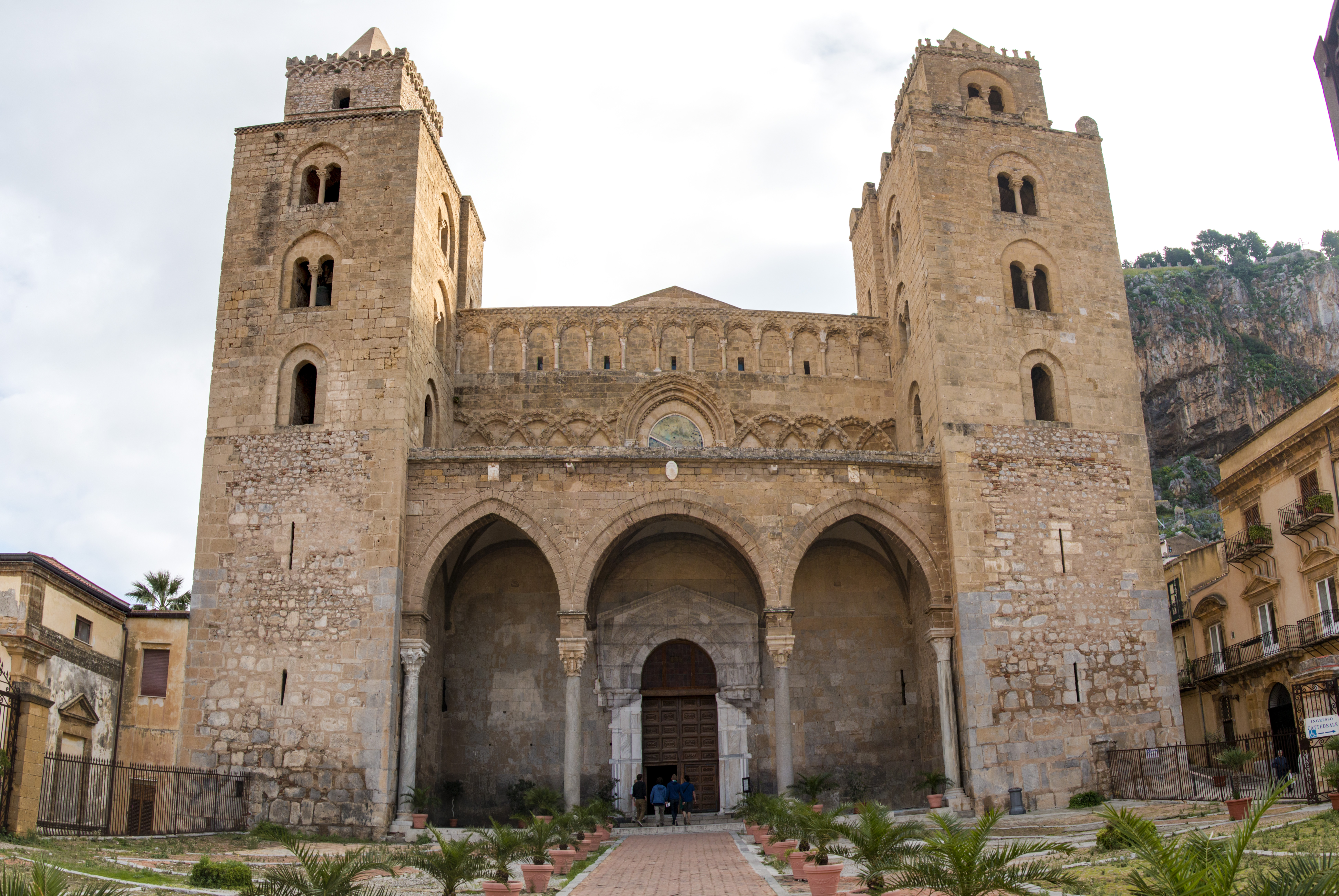 Cathédrale de Cefalù en Sicile